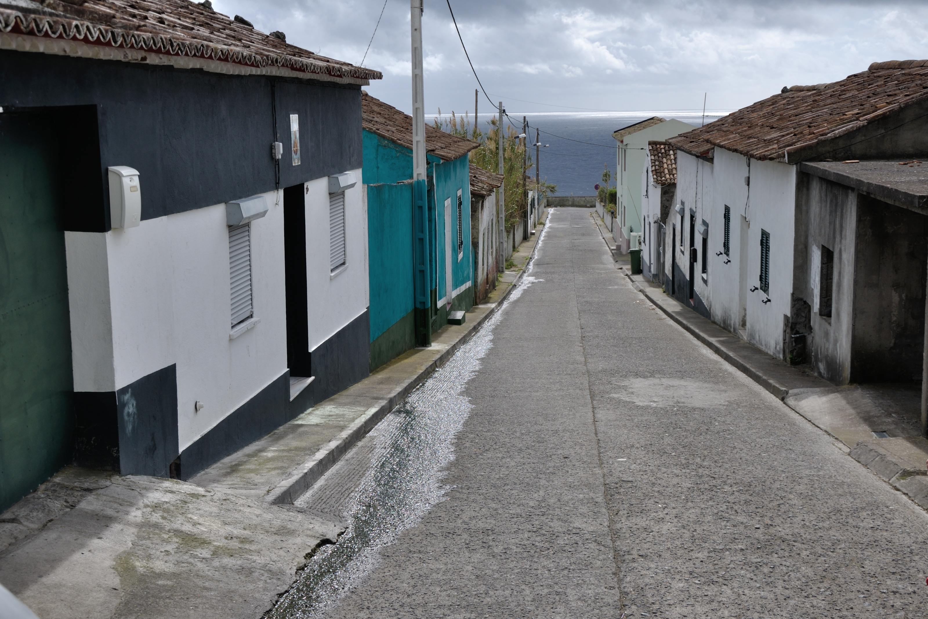 Portugal, Feteiras